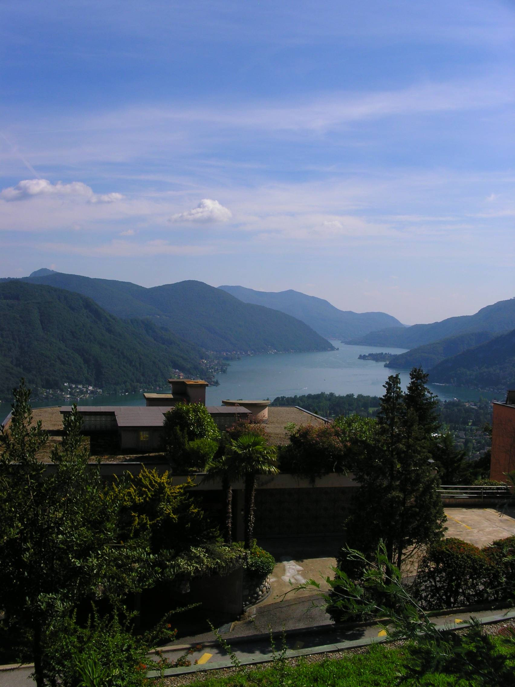 Lago di Lugano (ital: Lago di Ceresio) bei Vernate, Ticino